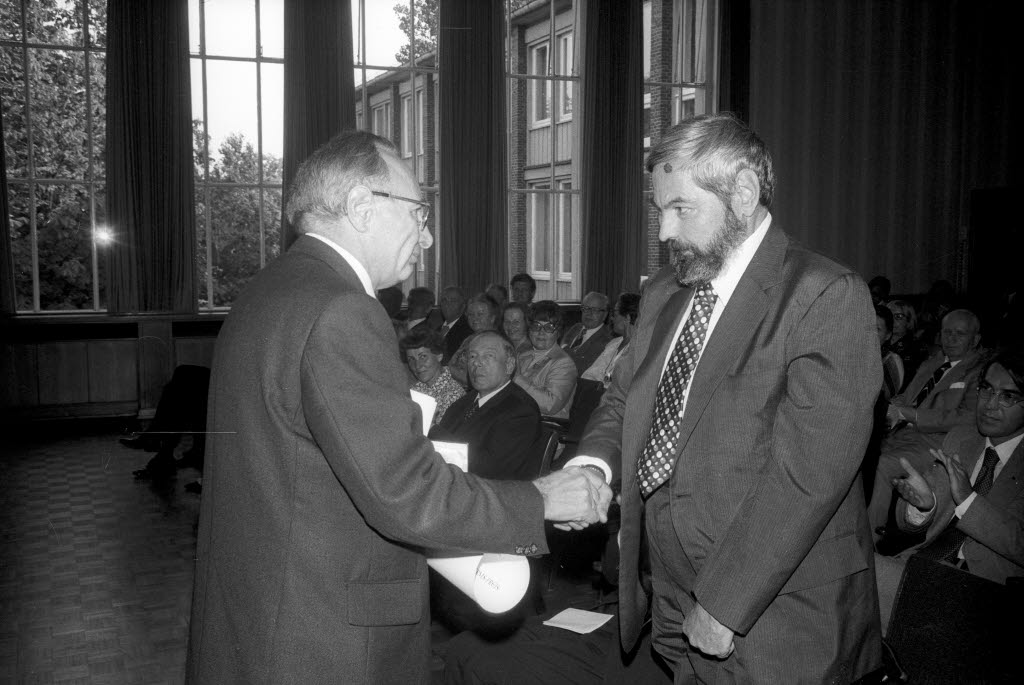 im Saal der Industrie- und Handelskammer (IHK). Der Direktor des Instituts für Weltwirtschaft (IfW) der Christian-Albrechts-Universität (CAU) Prof. Herbert Giersch (links) überreicht den Preis an den amerik. Wirtschaftswissenschaftler Prof. Harry Gordon Johnson (rechts) von der Universität Chicago.